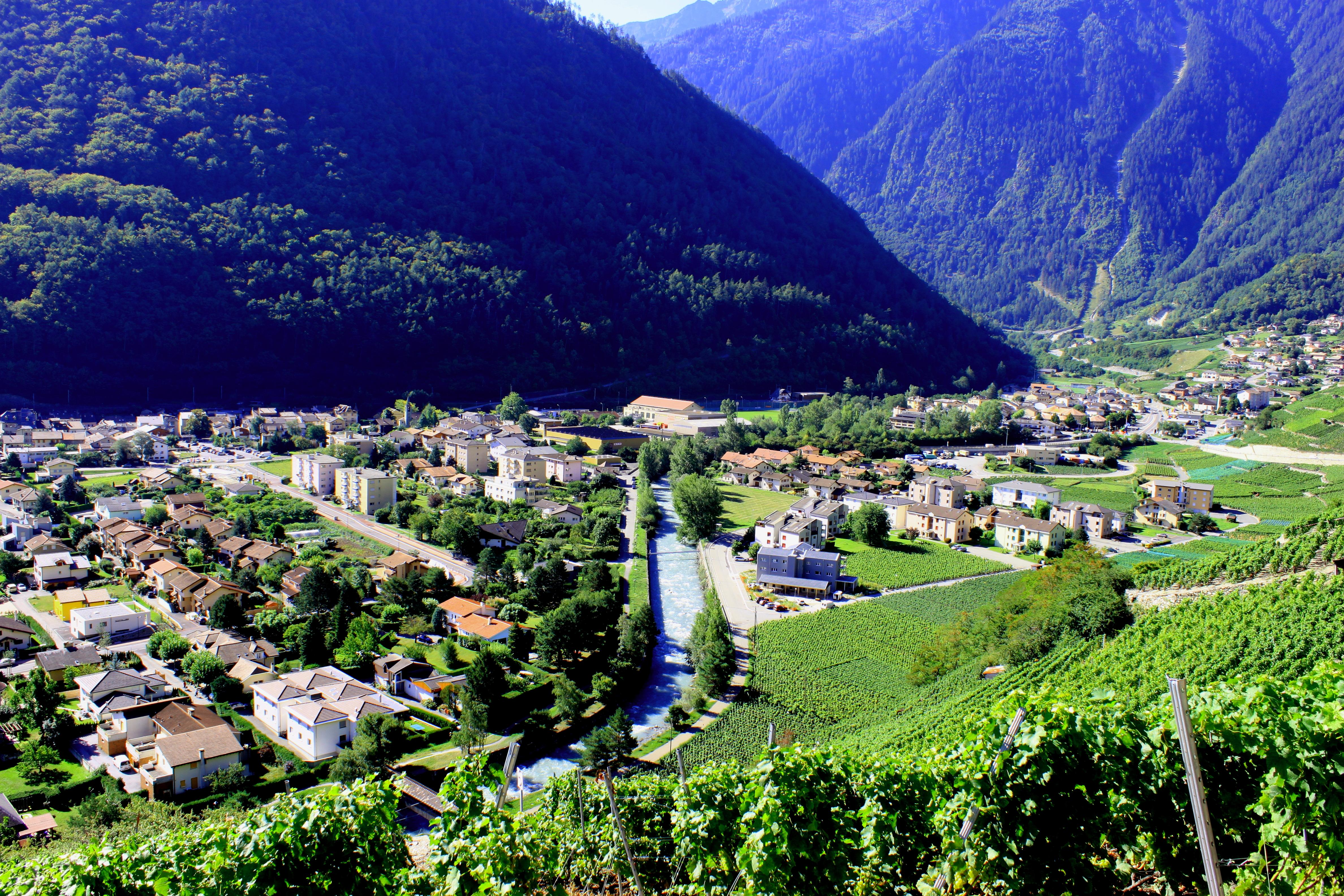 Suisse, canton du Valais, Martigny, ville romaine et moderne, vue de la partie "Bourg".